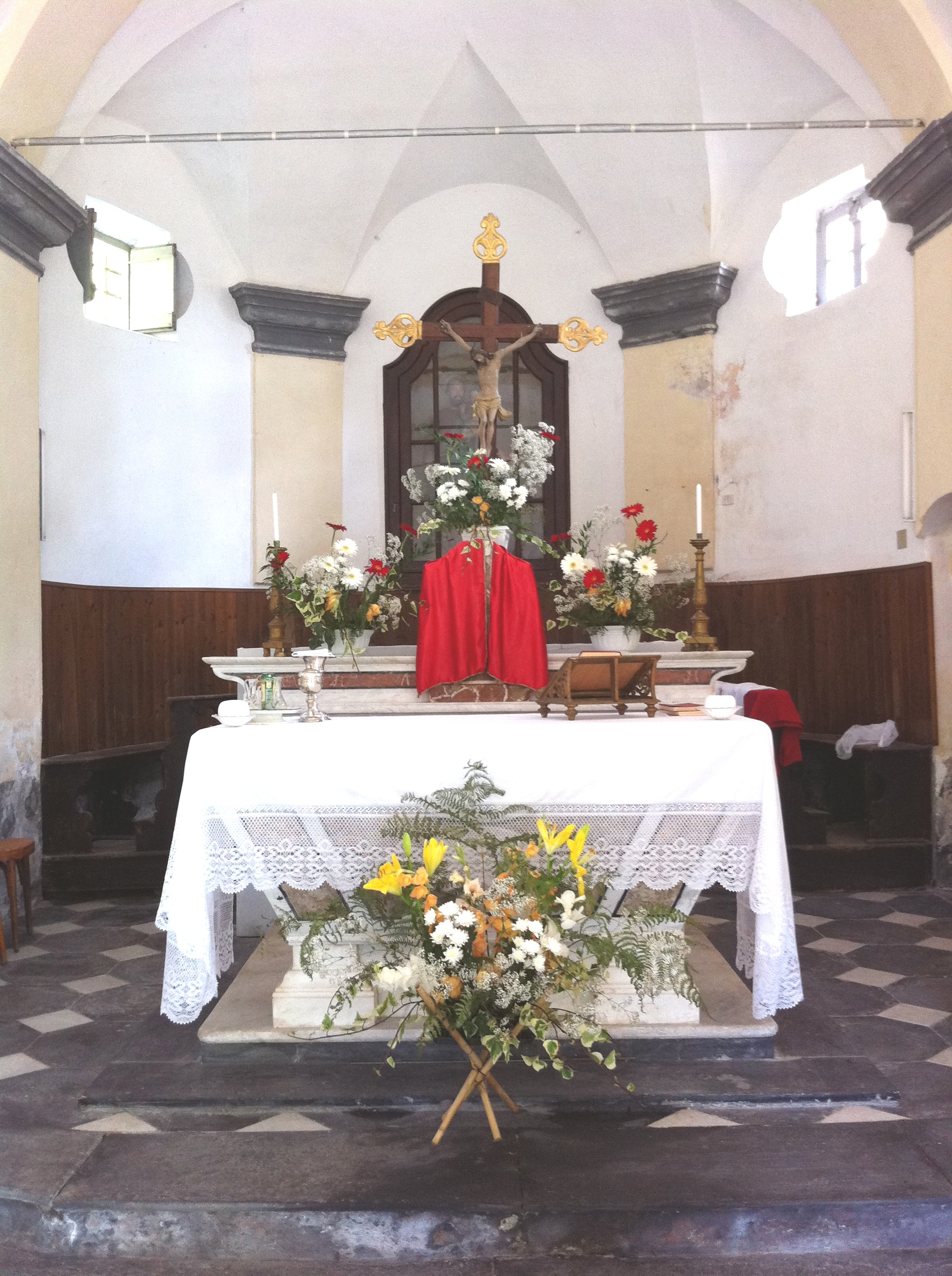 Cappella di San Pietro, Loc. Teglia, comune di Stella, (SV - Italy)